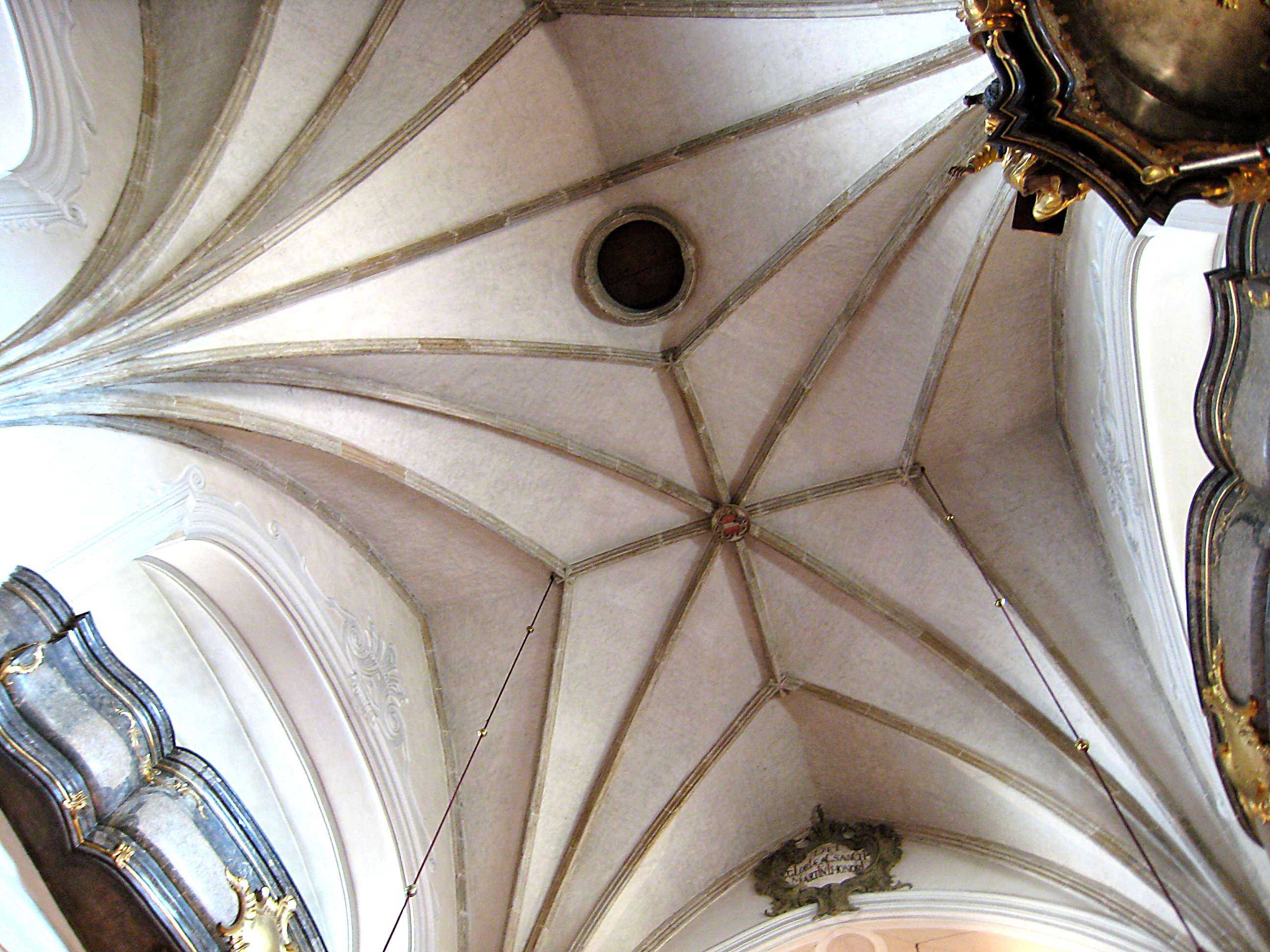 Hartberg Stadtpfarrkirche Gotisches Sternrippengewölbe